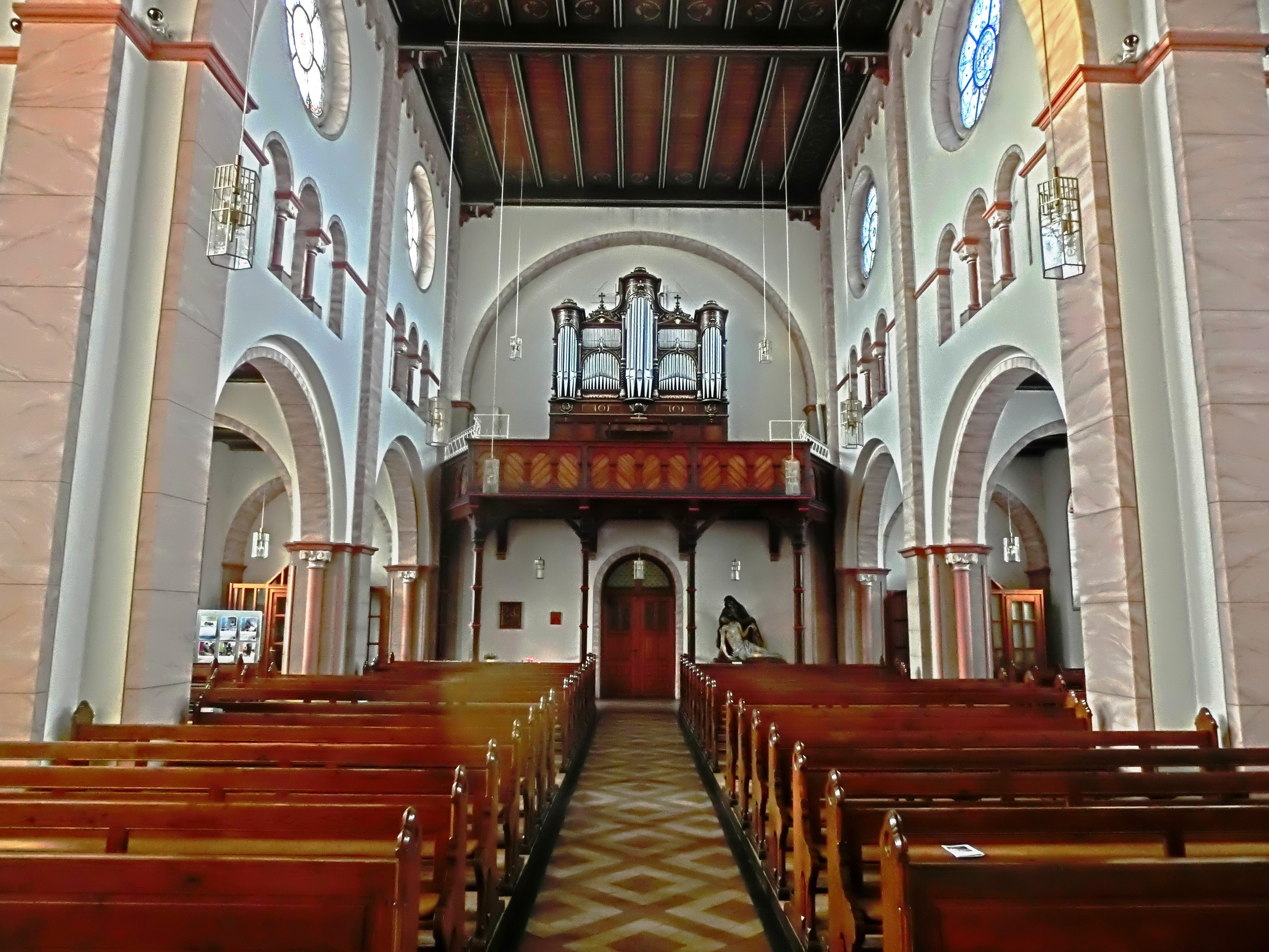 St. Martin (Nörten-Hardenberg) Bedeutend ist die Orgel, die 1904 von der Orgelbaufirma Furtwängler und Hammer erbaut worden ist. Das deutsch-romantisch disponierte Instrument ist nahezu original erhalten und wurde 1995 von dem Orgelbauer Christian Scheffler umfassend restauriert.